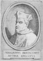 Ritratto di Pellegrino Bertacchi (1567-1627). Riproduzione personale dell'incisione di Lodovico Vedriani